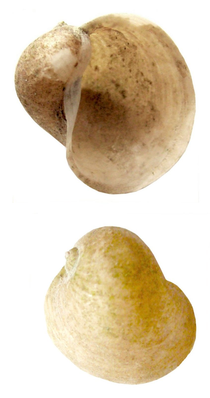 Radix ampla, syn. Limnaea peregra var. ampla